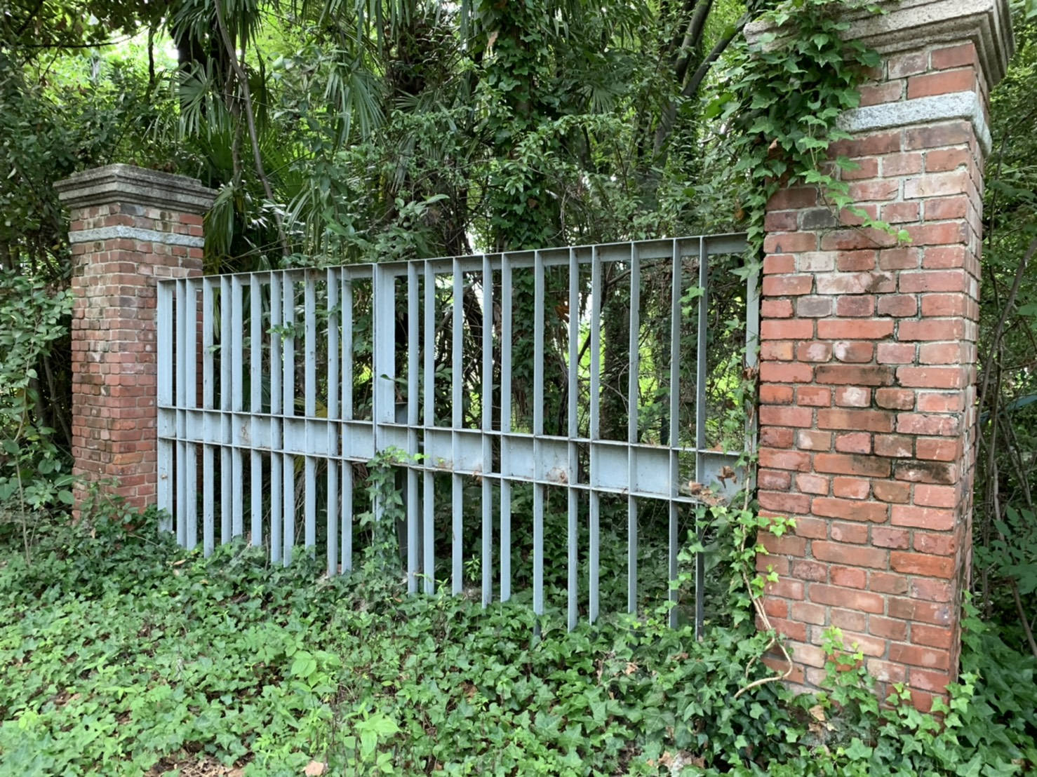 京都市伏見区にあった戦争遺跡である。市民団体によって保存されている。